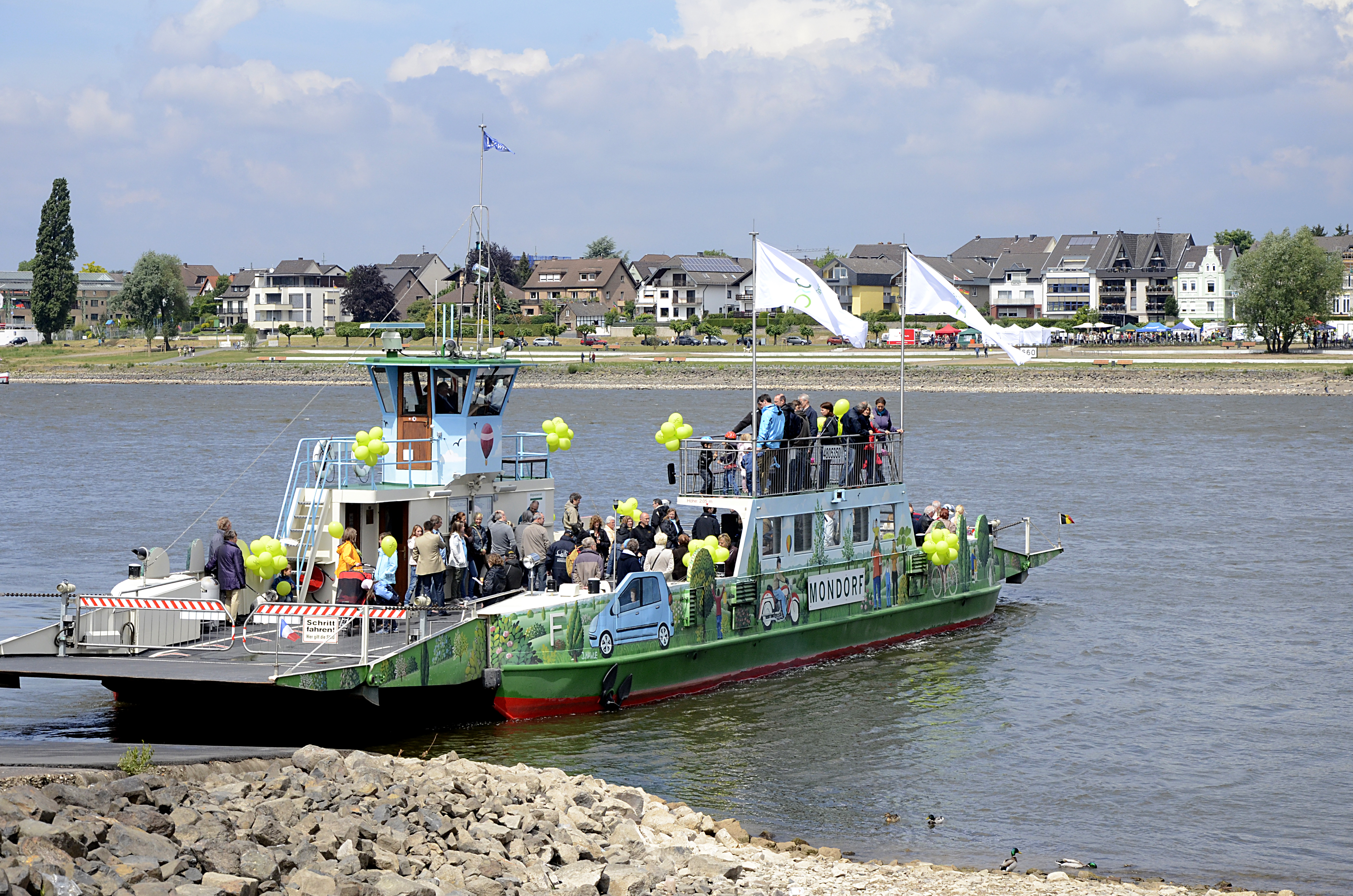 Mondorfer Fähre am Estermannufer in Bonn-Graurheindorf, Brückenschlag Grünes C; im Hintergrund Mondorf